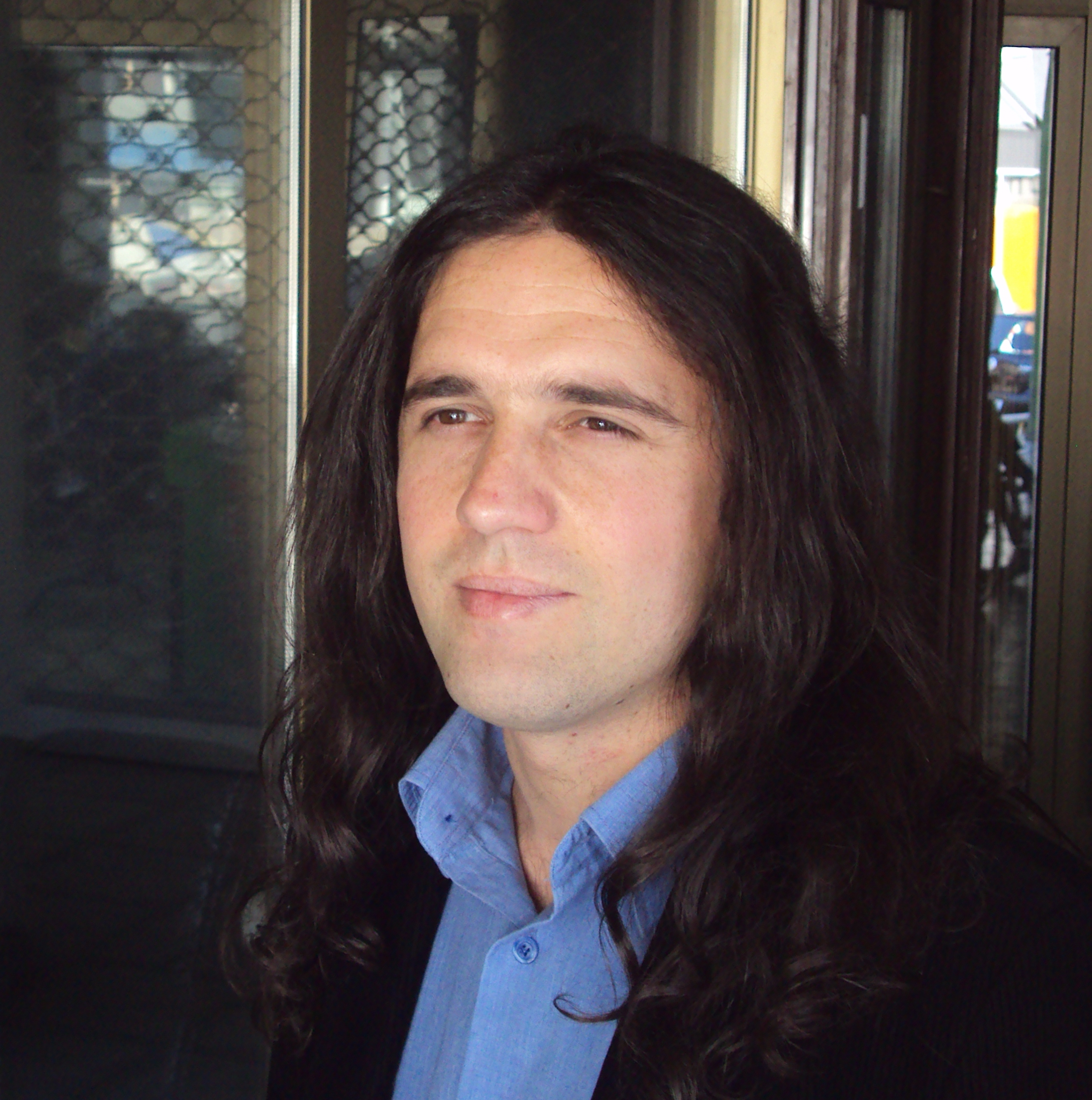 Jeton Muja